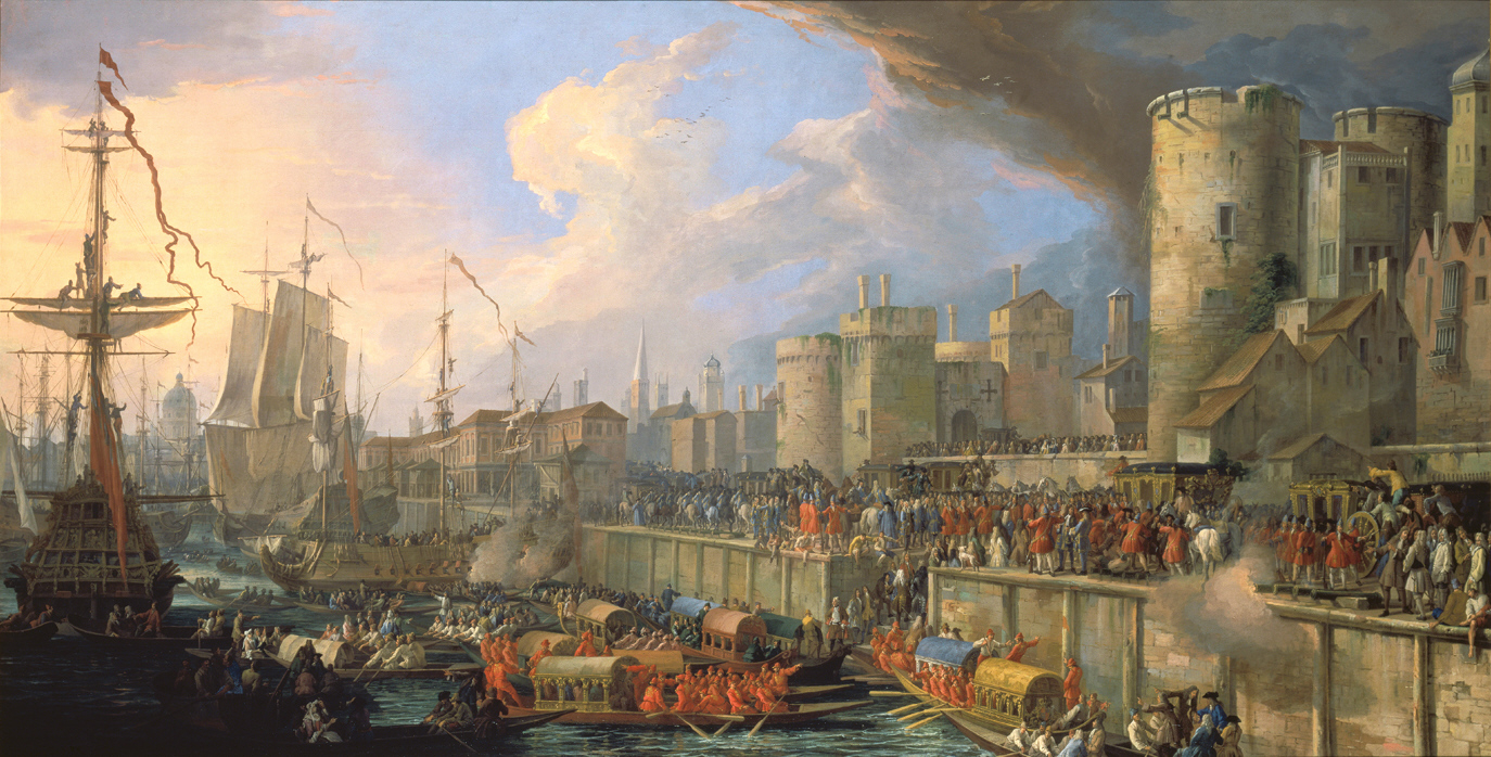 Der Einzug der venezianischen Gesandten Erizzo und Pisani in London 1707title QS:P1476,de:"Der Einzug der venezianischen Gesandten Erizzo und Pisani in London 1707" label QS:Lde,"Der Einzug der venezianischen Gesandten Erizzo und Pisani in London 1707"